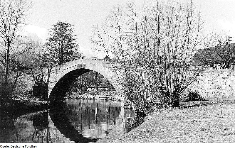 Original image description from the Deutsche Fotothek Hainewalde. Himmelsbrücke